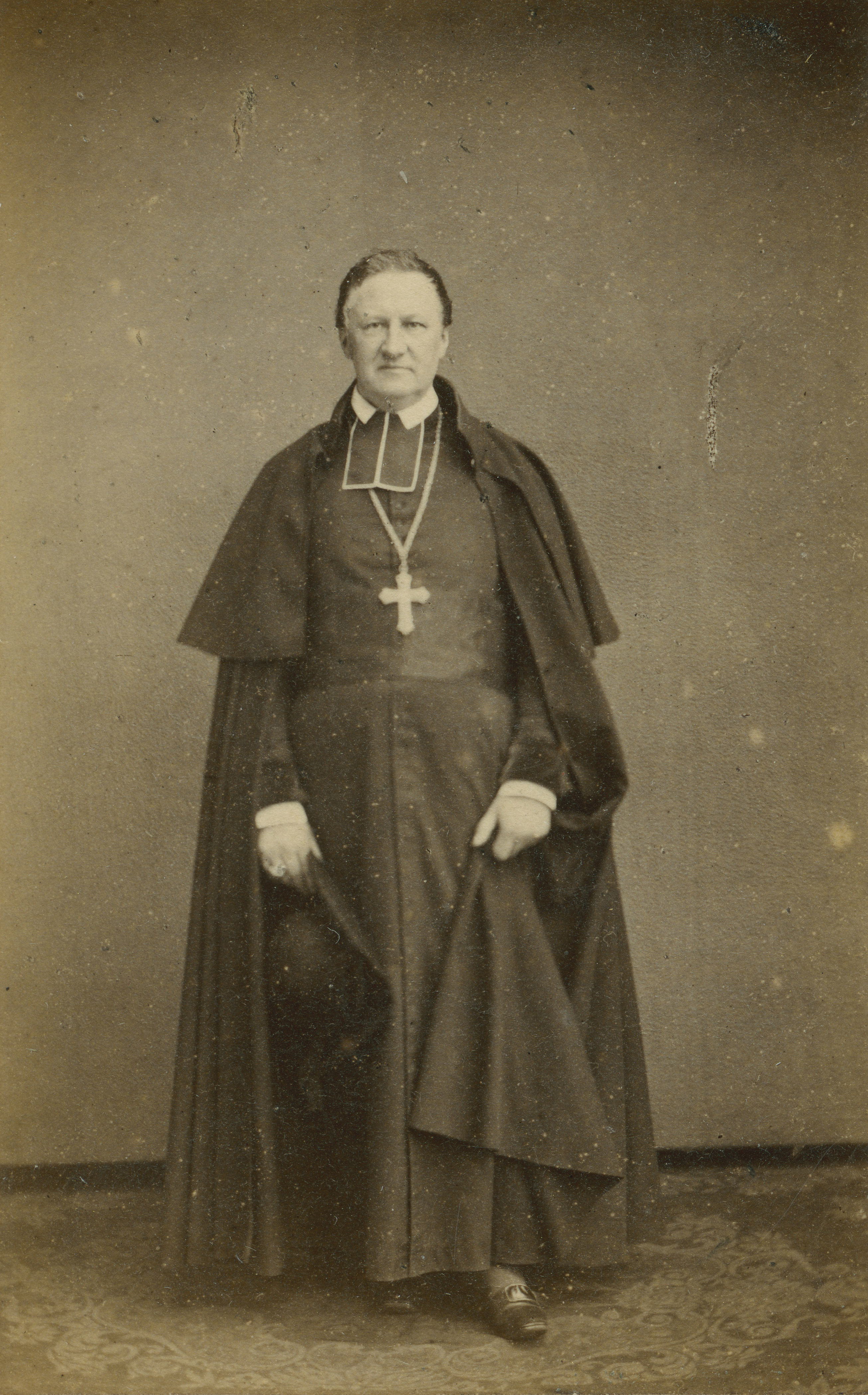 Foto van Joannes Baptista Malou (1809-1864), bischop van Brugge